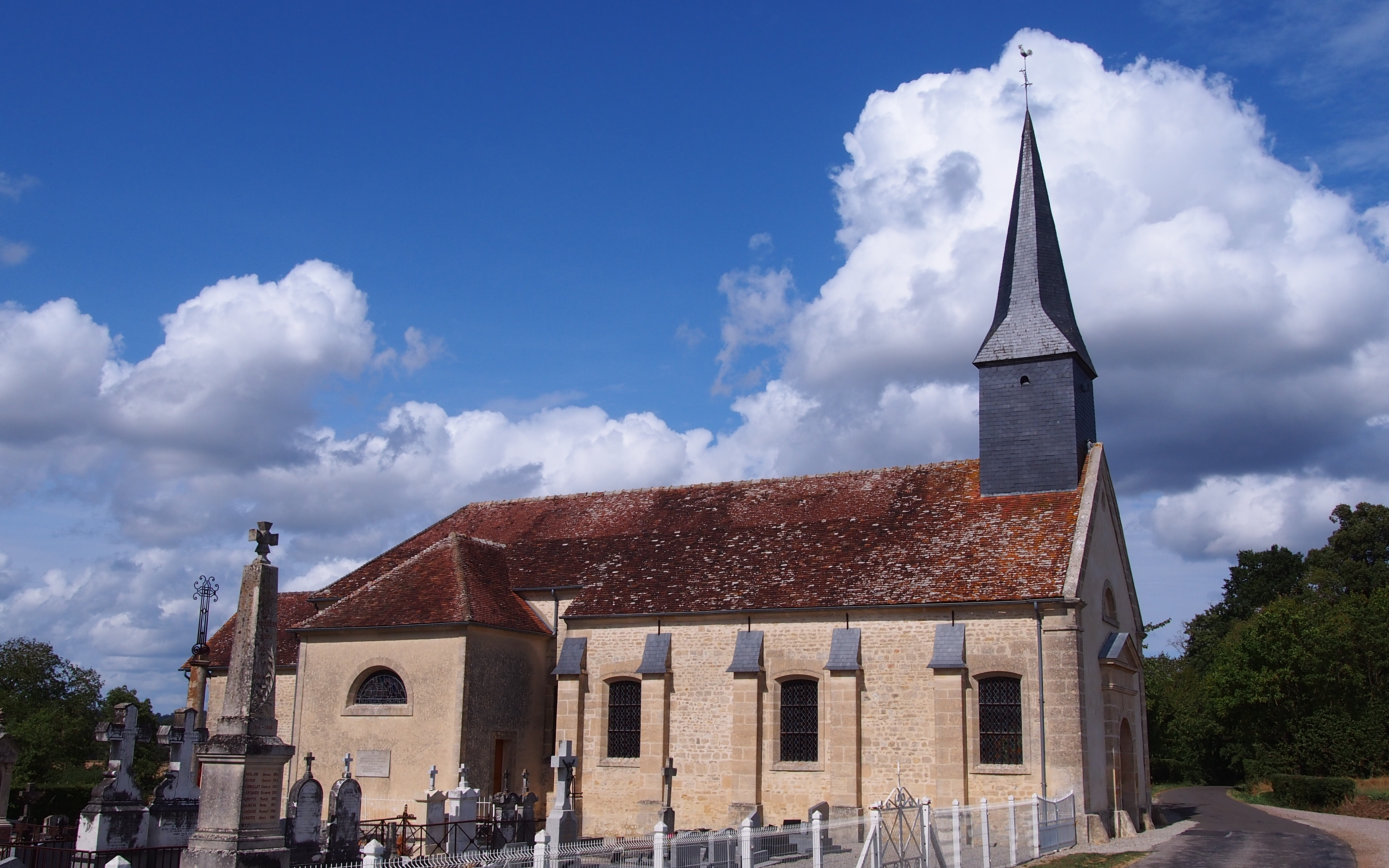 Villebadin (Normandie, France). L'église Saint-Jean-Baptiste.